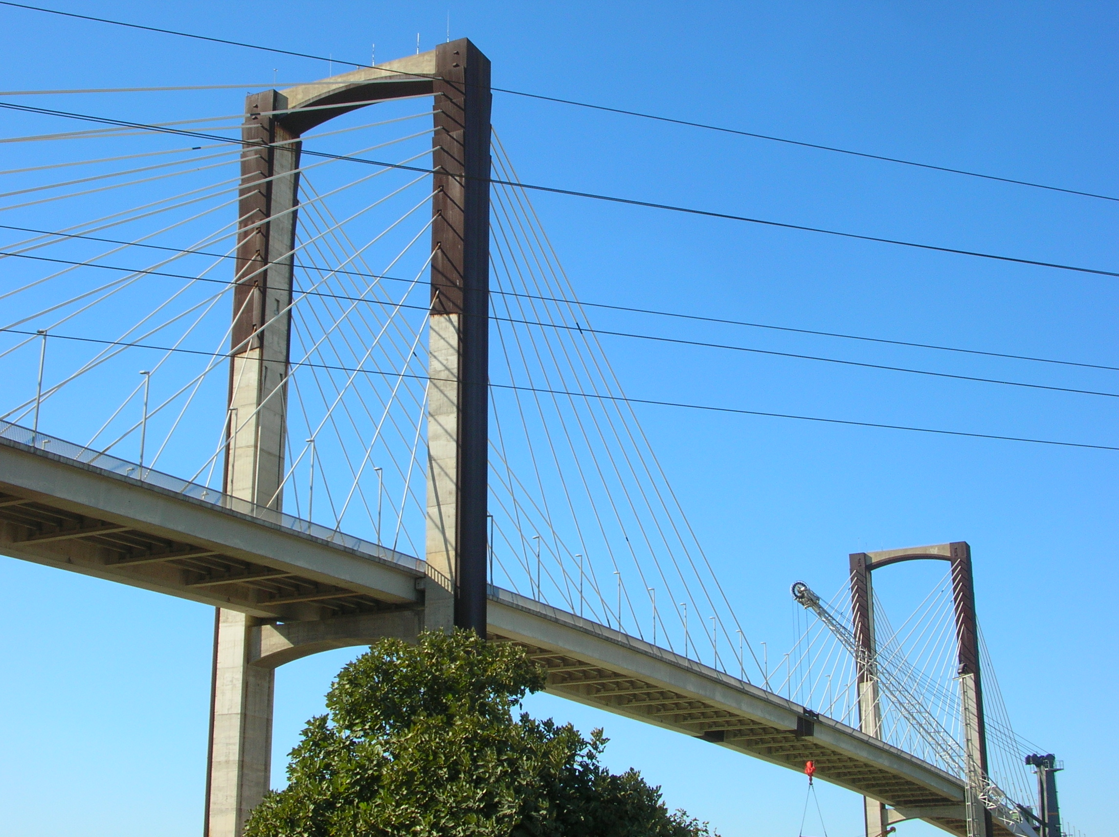 Pont du Cinquième Centenaire (Séville). Puente del Quinto Centenario (Sevilla).